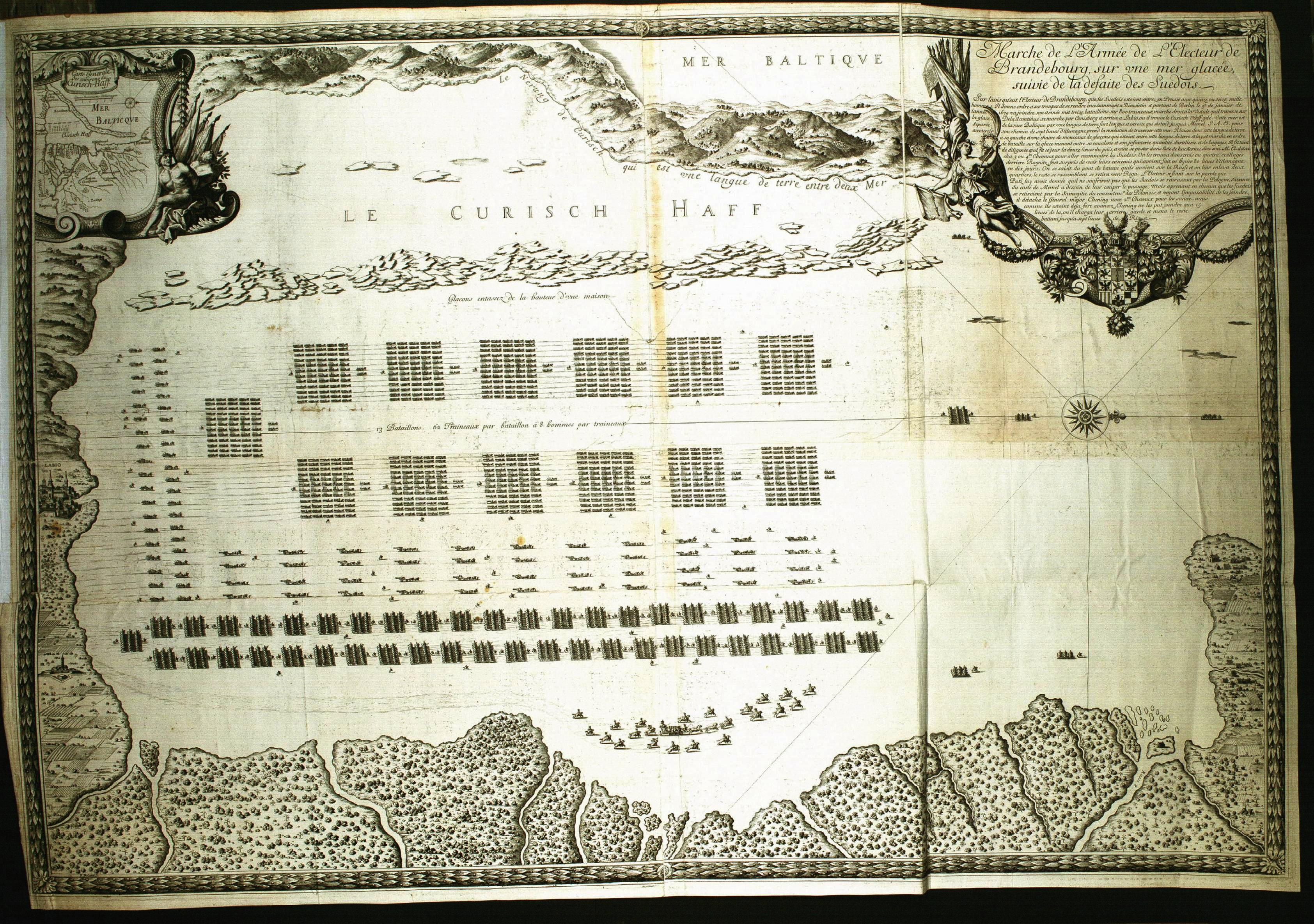 Gezeigt wird der Marsch des brandenburgischen Heeres über das Kurische Haff im Jahre 1679 beim Überganges über das Haff zwischen Festland und Nehrung. Am linken Bildrand erkennt man Labiau, beim Bild links oben befindet sich eine kleine, nach Westen ausgerichete Übersichtskarte mit Memel am rechten Kartenrand. Der Maßstab sind: 5 gemeine deutsche Meilen entprechen 4 cm. (Beschreibung in französischer Sprache)